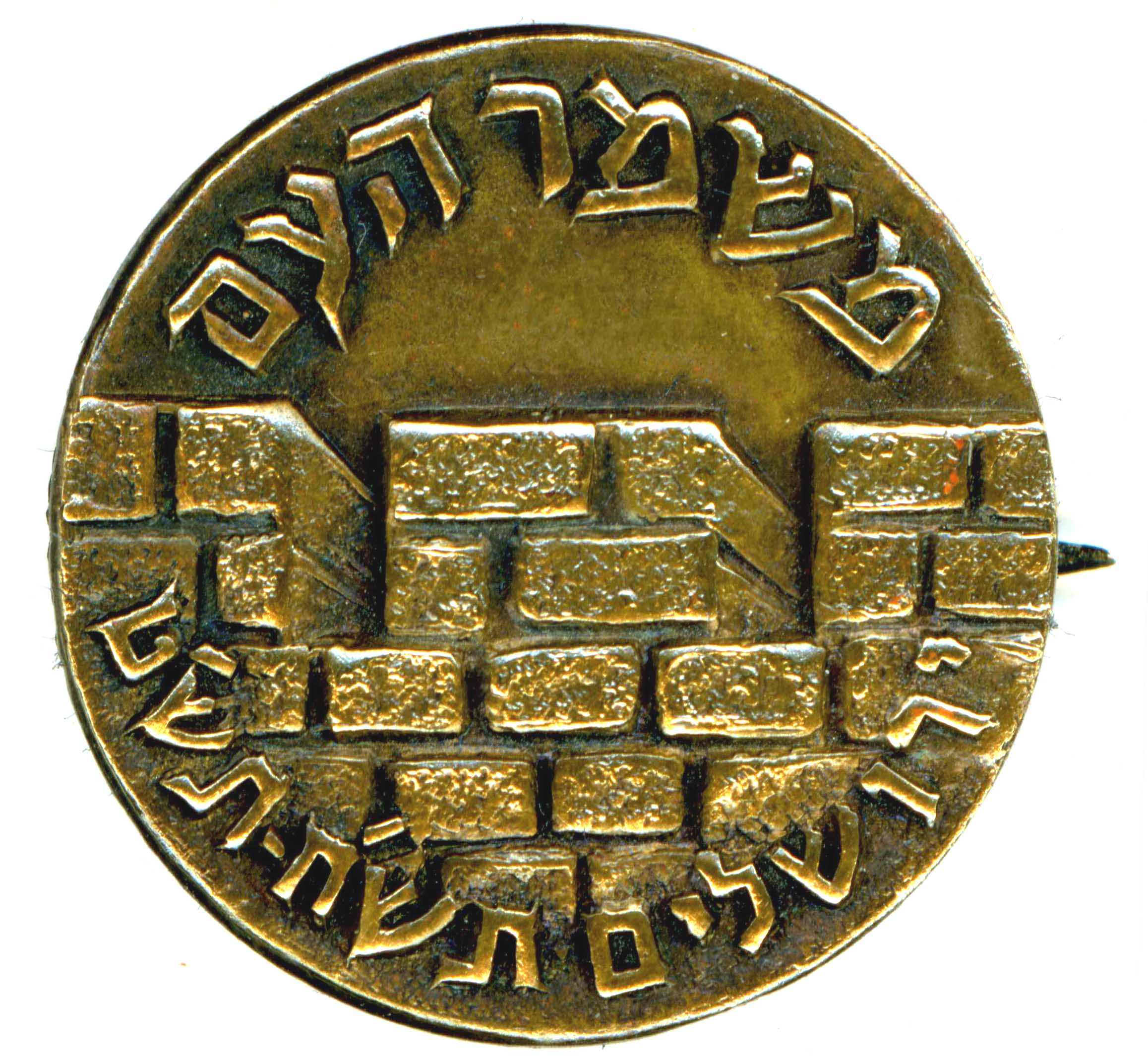 סיכת ברונזה "משמר העם" ירושלים תש"ח - תש"ט.